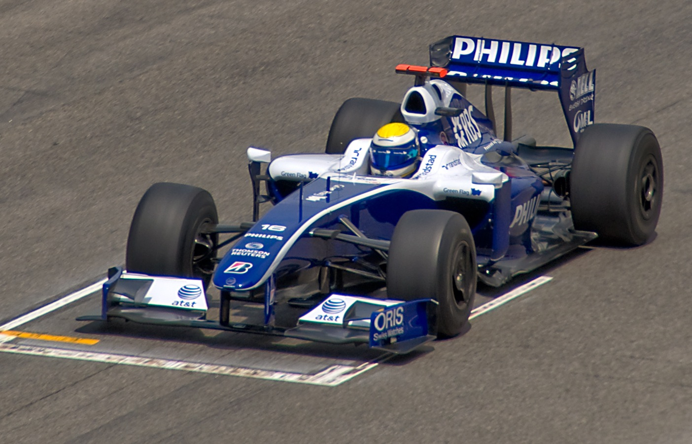 Nikon D90 + Sigma 18-200 DC OS HSM 1/1000s - F/6.3 - 200mm - ISO280